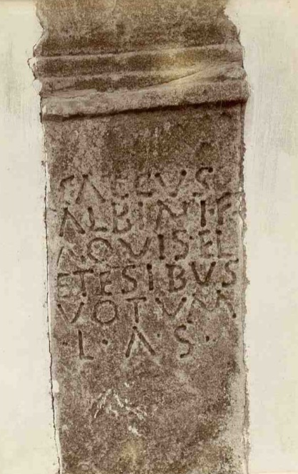 Fotografía antigua de la estela votiva romana encontrada en los Baños de Retortillo